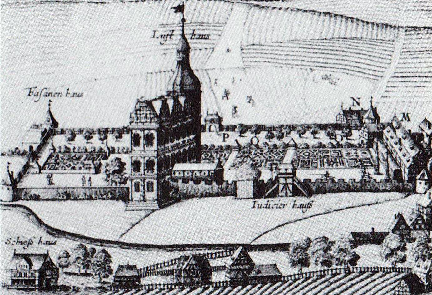 Gartenanlagen mit Lusthaus, Auschnitt aus der Stadtansicht von Ansbach (Kupferstich, 1642)